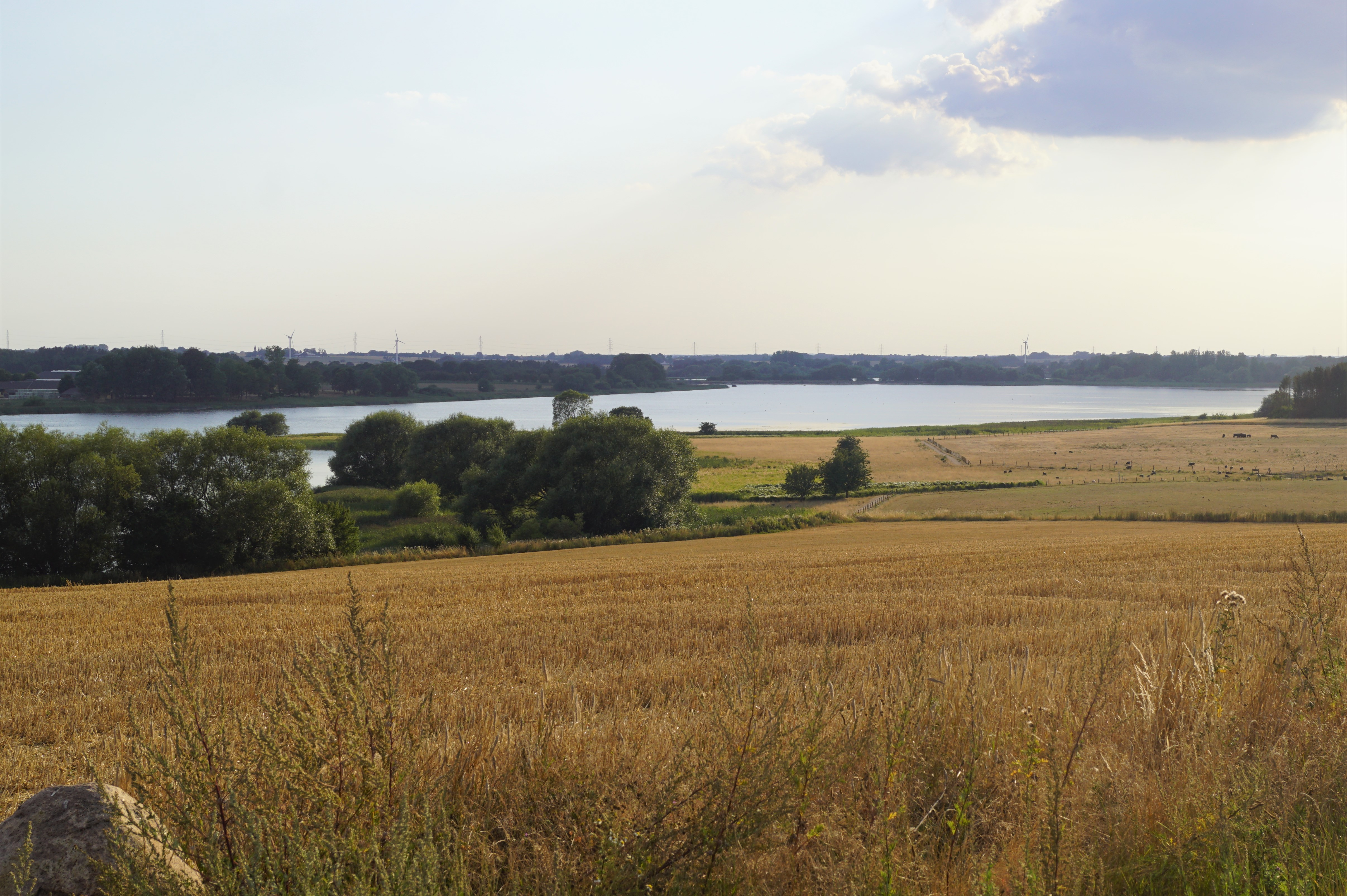 Haraldsted Sø set mod vest